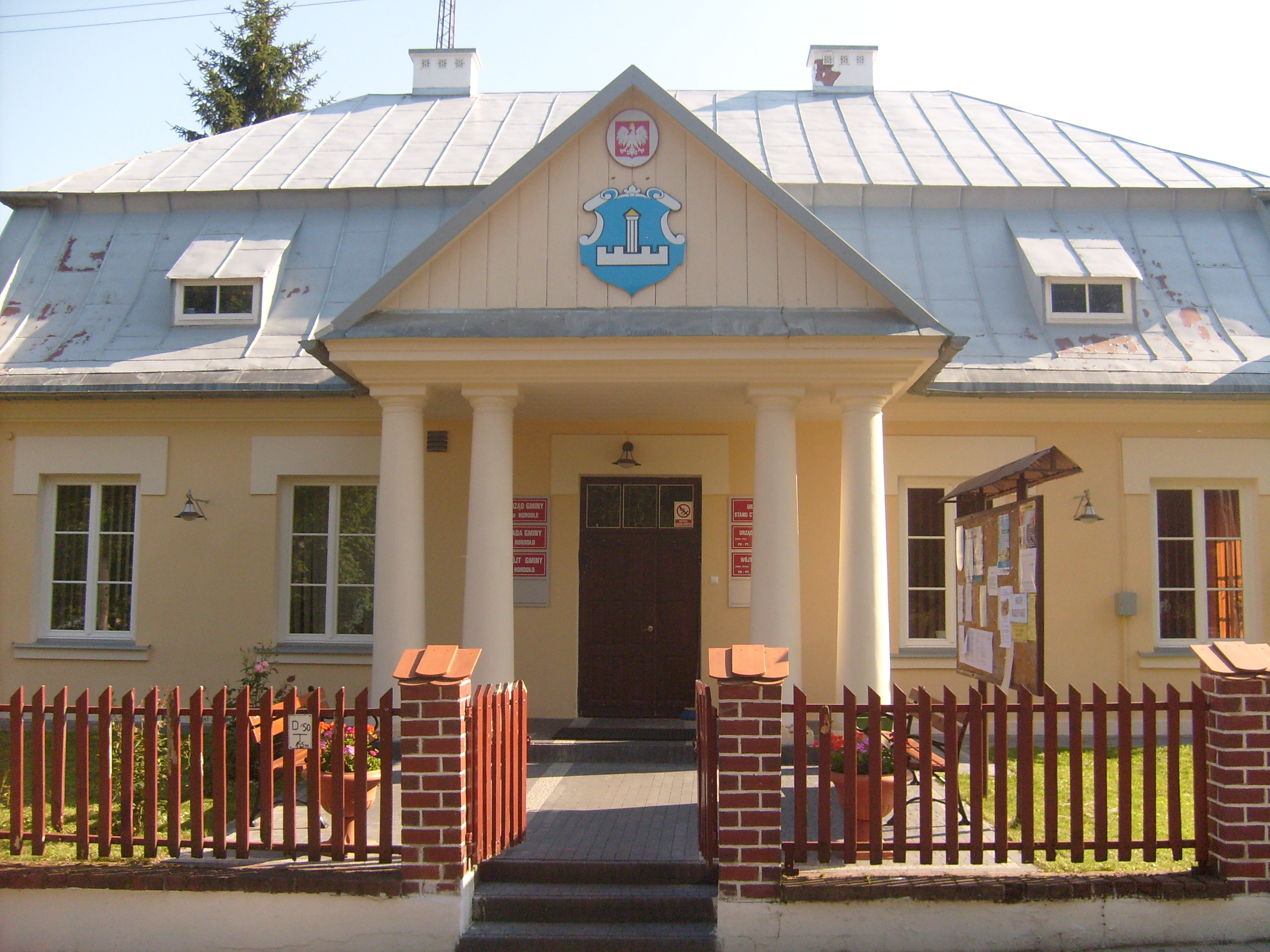 Budynek urzędu gminy w Horodle (1923) 09.1988.